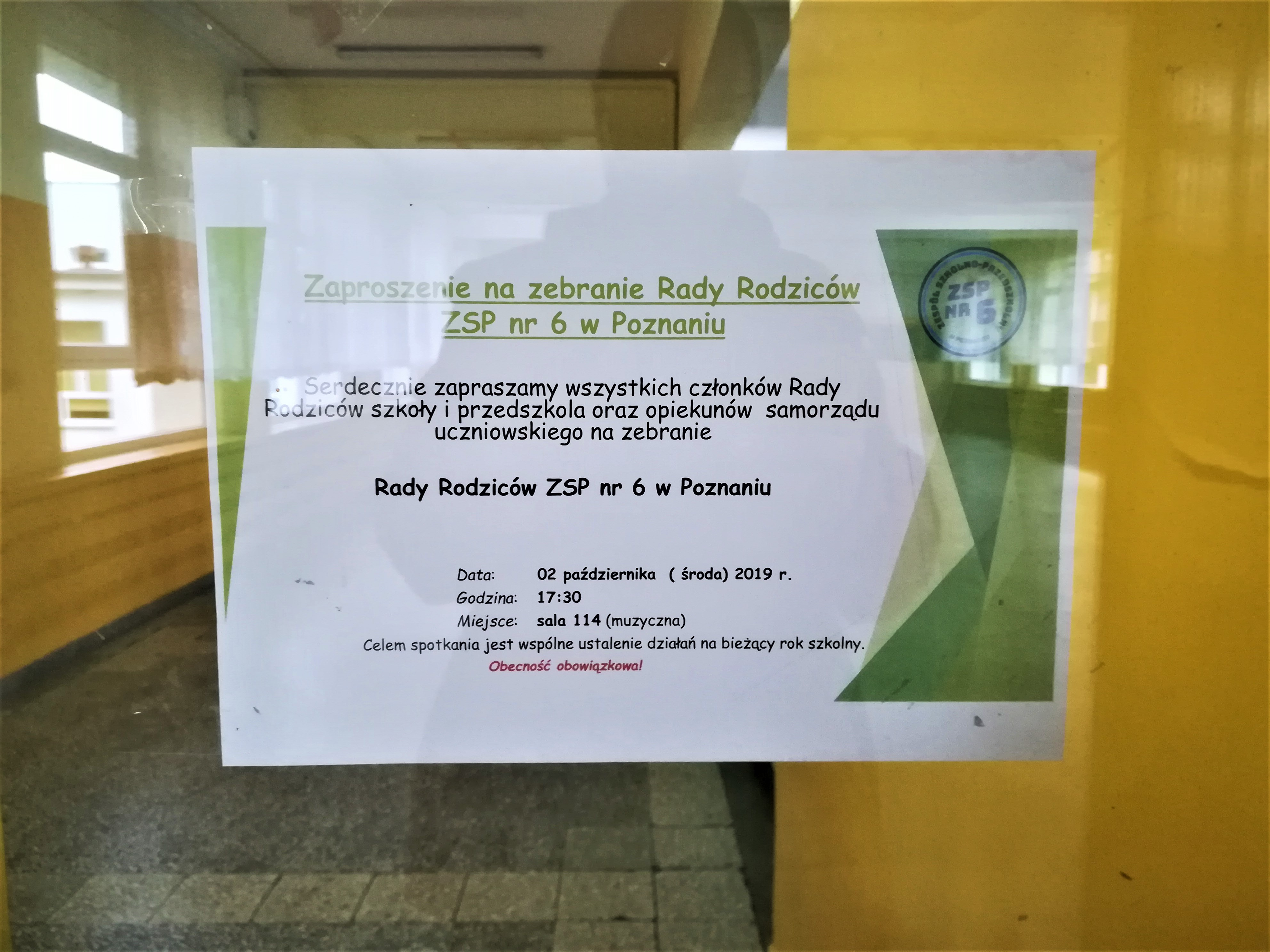 Ogłoszenie Rady Rodziców w poznańskiej szkole.